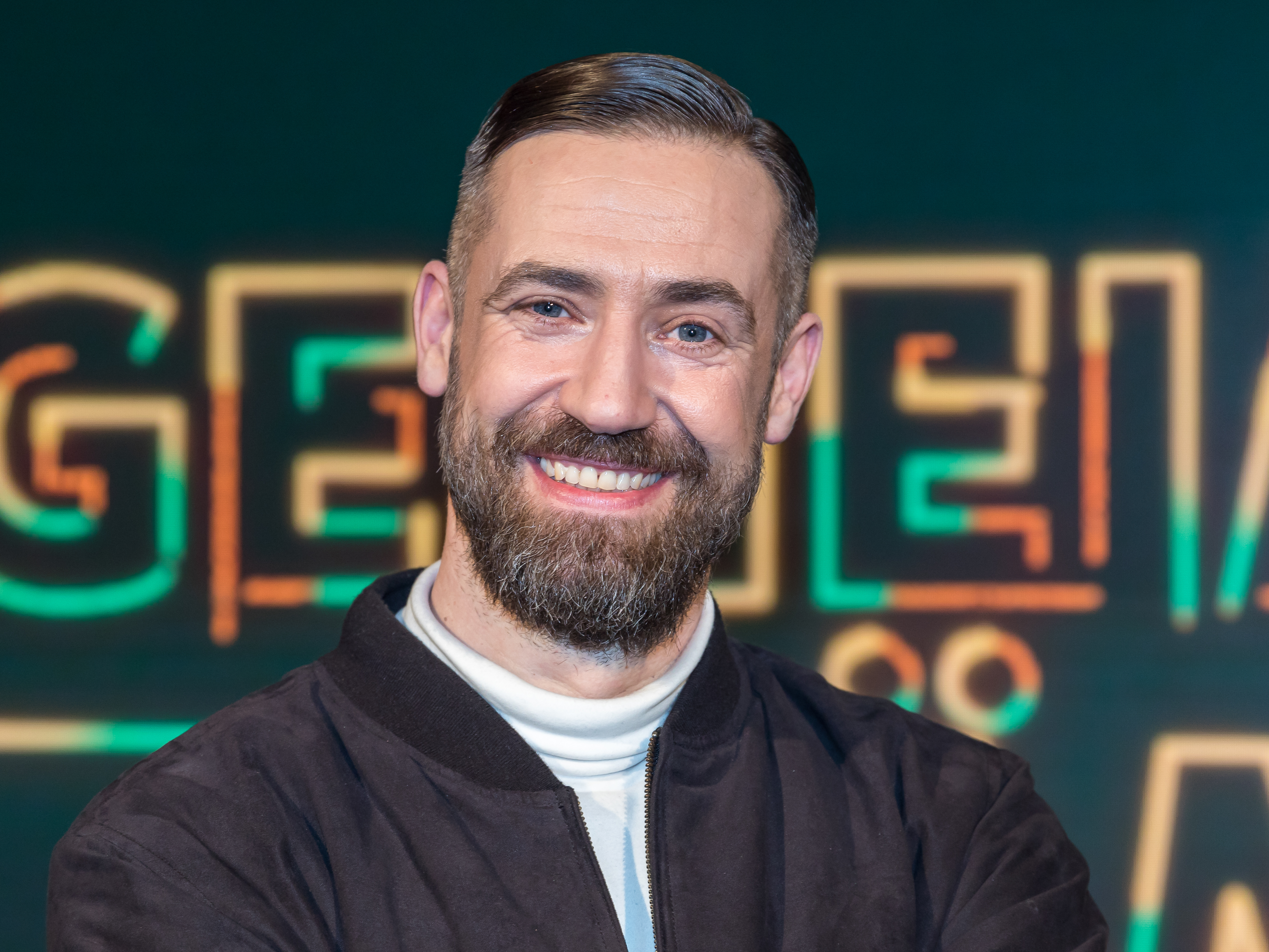 „Geheimniskrämer“ mit Martin Klempnow und seinen Gästen. Aufzeichnung des Westdeutschen Rundfunks im Studio Köln-Bocklemünd vom 24. Januar 2018 Foto: Bürger Lars Dietrich